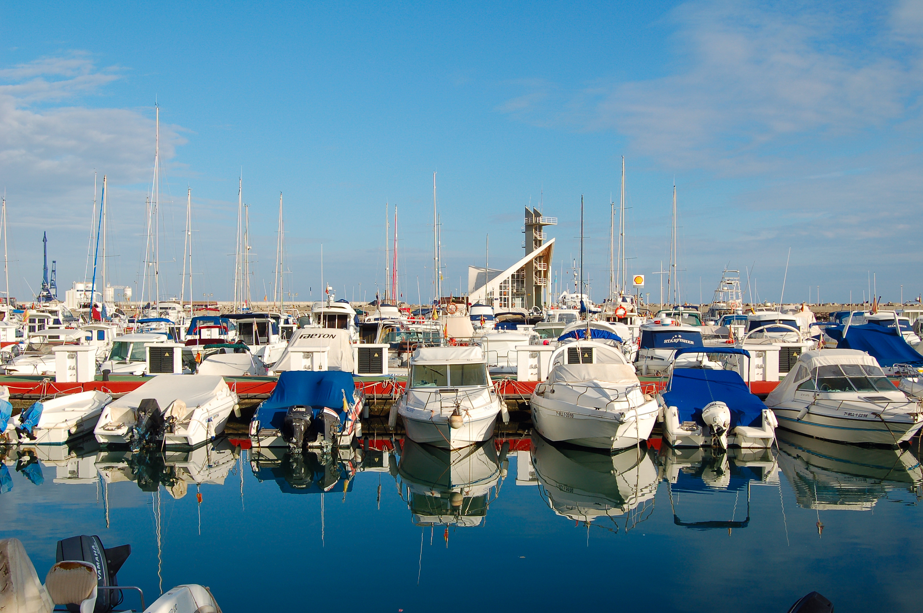 Embarcadero Puerto Noray